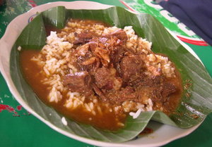 Jawa: Panganan khas Pati